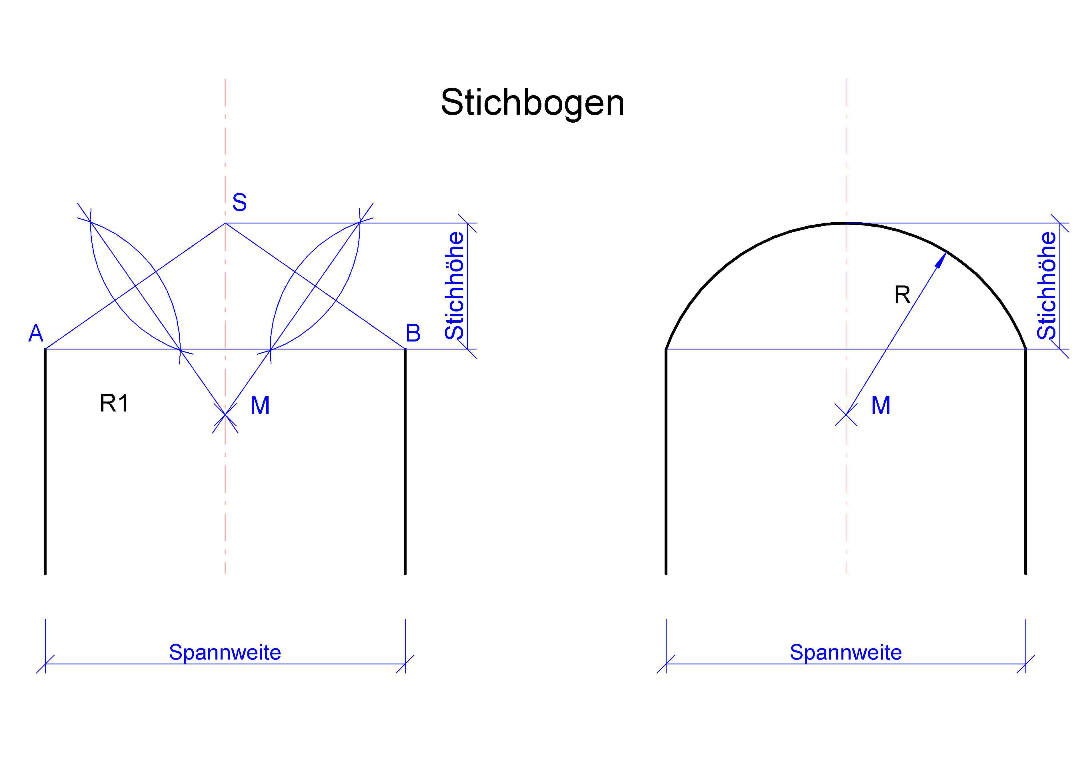 Konstruktion Stichbogen